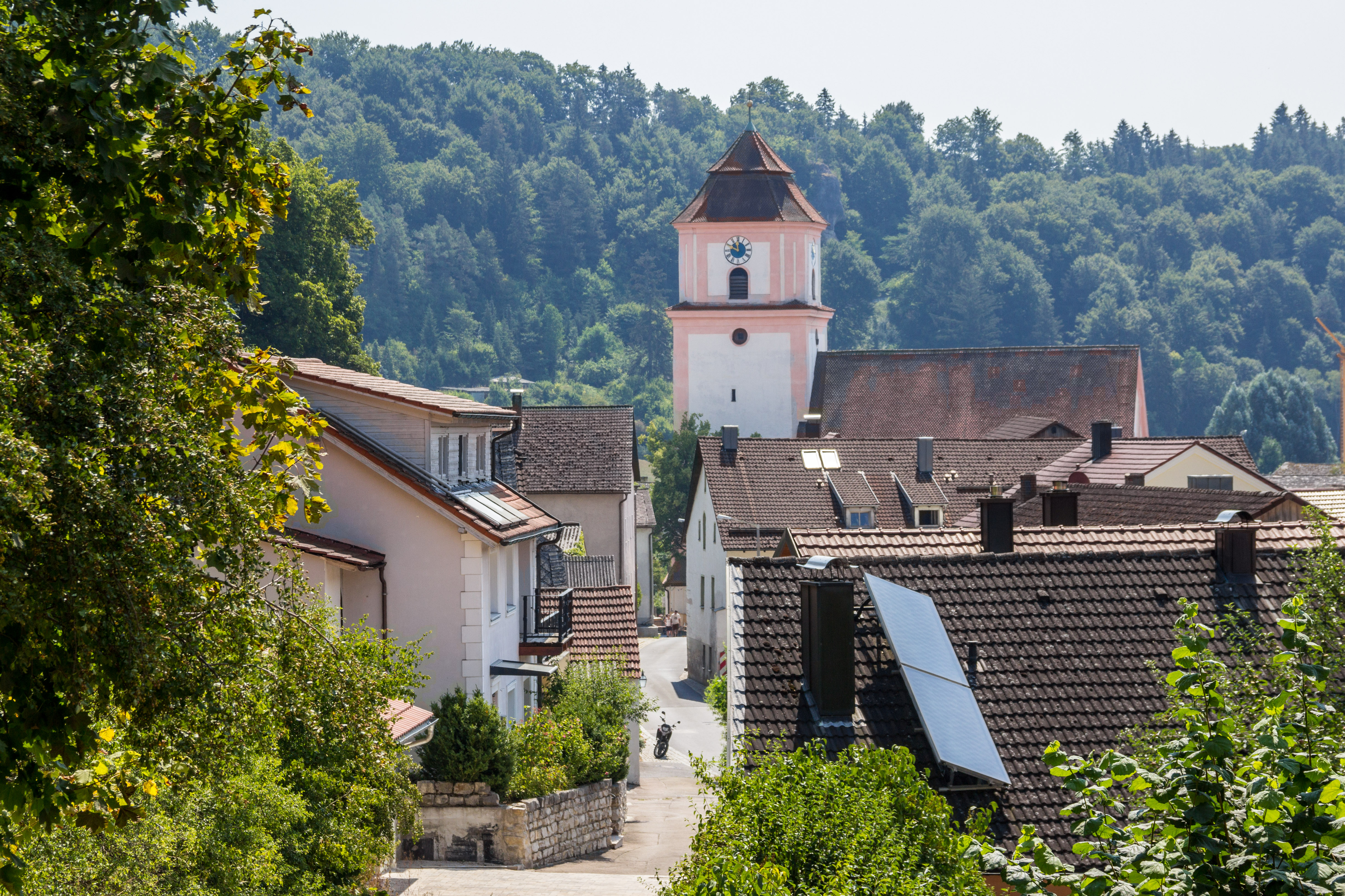 Breitenbrunn, Pfarrkirche Mariä Himmelfahrt